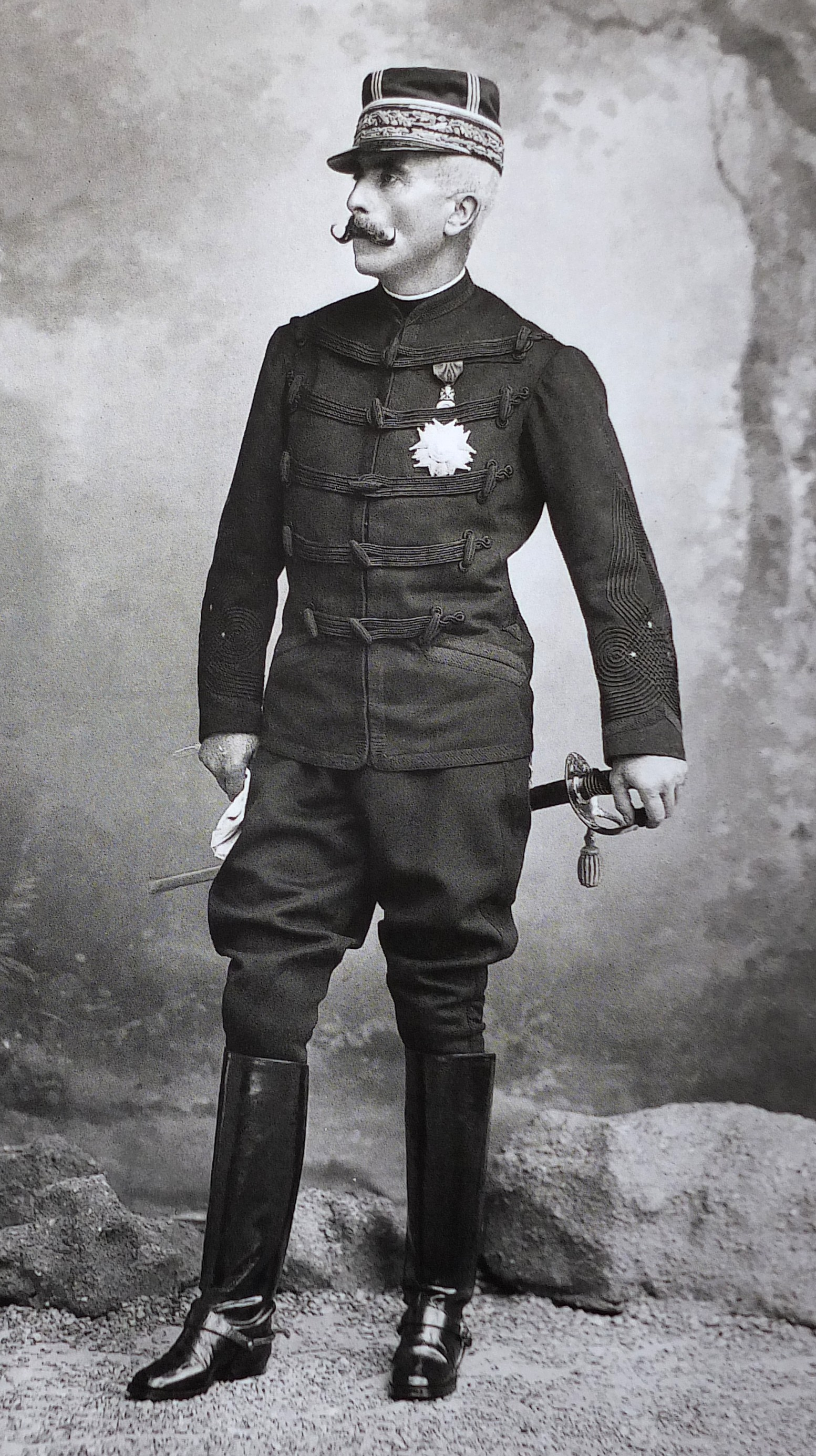 Général Gaston de Galliffet, photographié en 1893 par Paul Nadar.